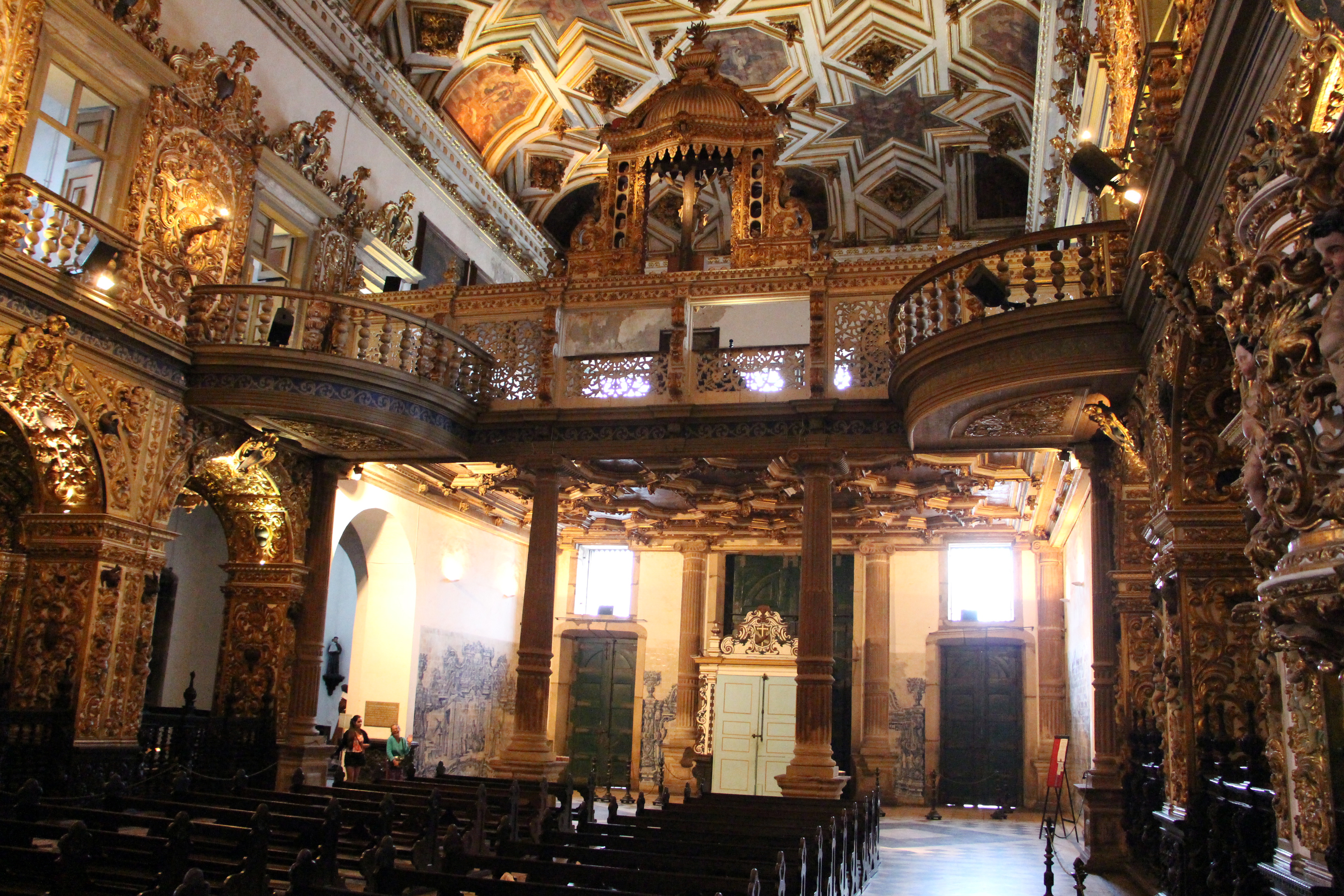 Igreja de São Francisco (Salvador)